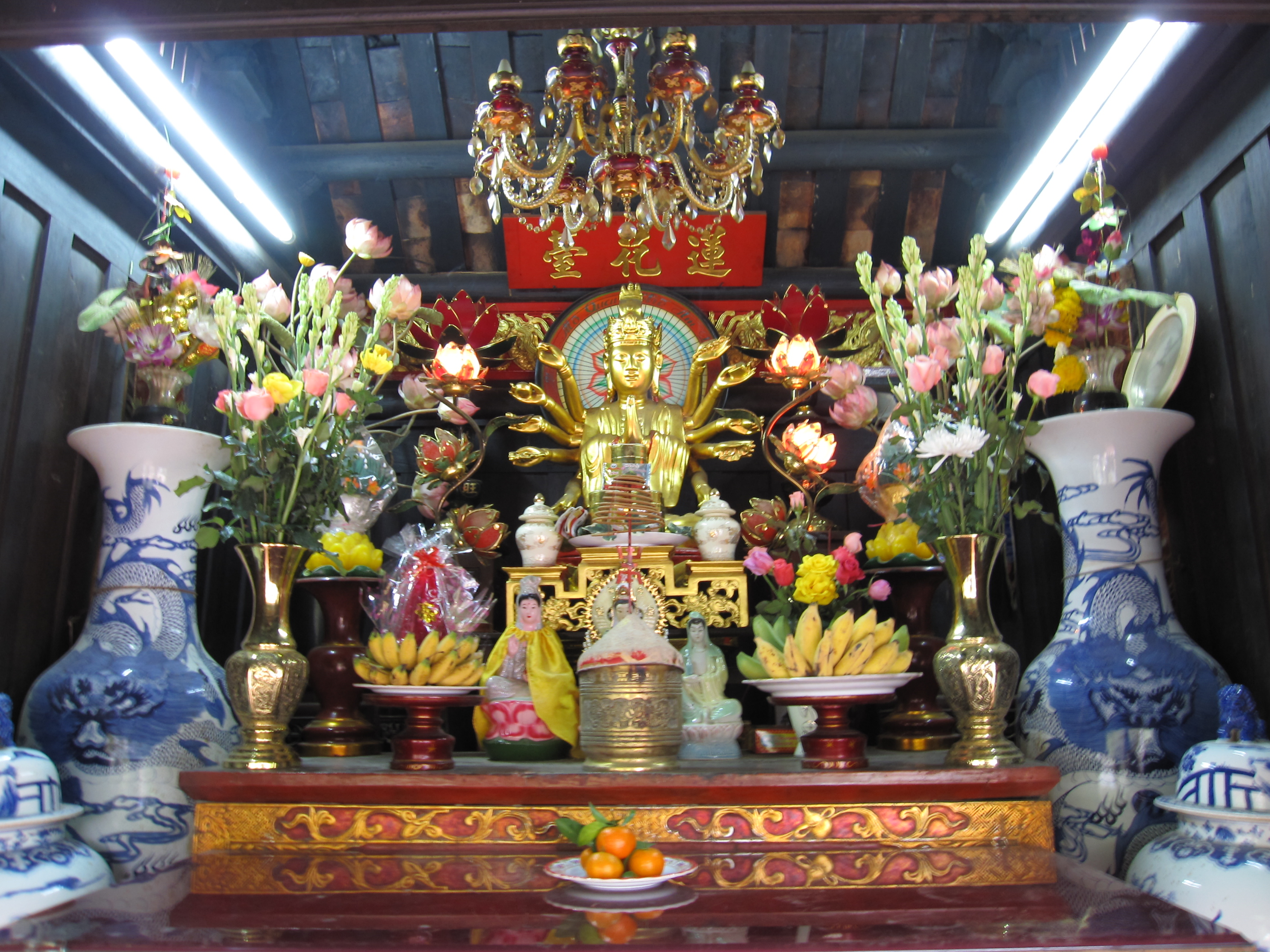 One Pillar Pagoda